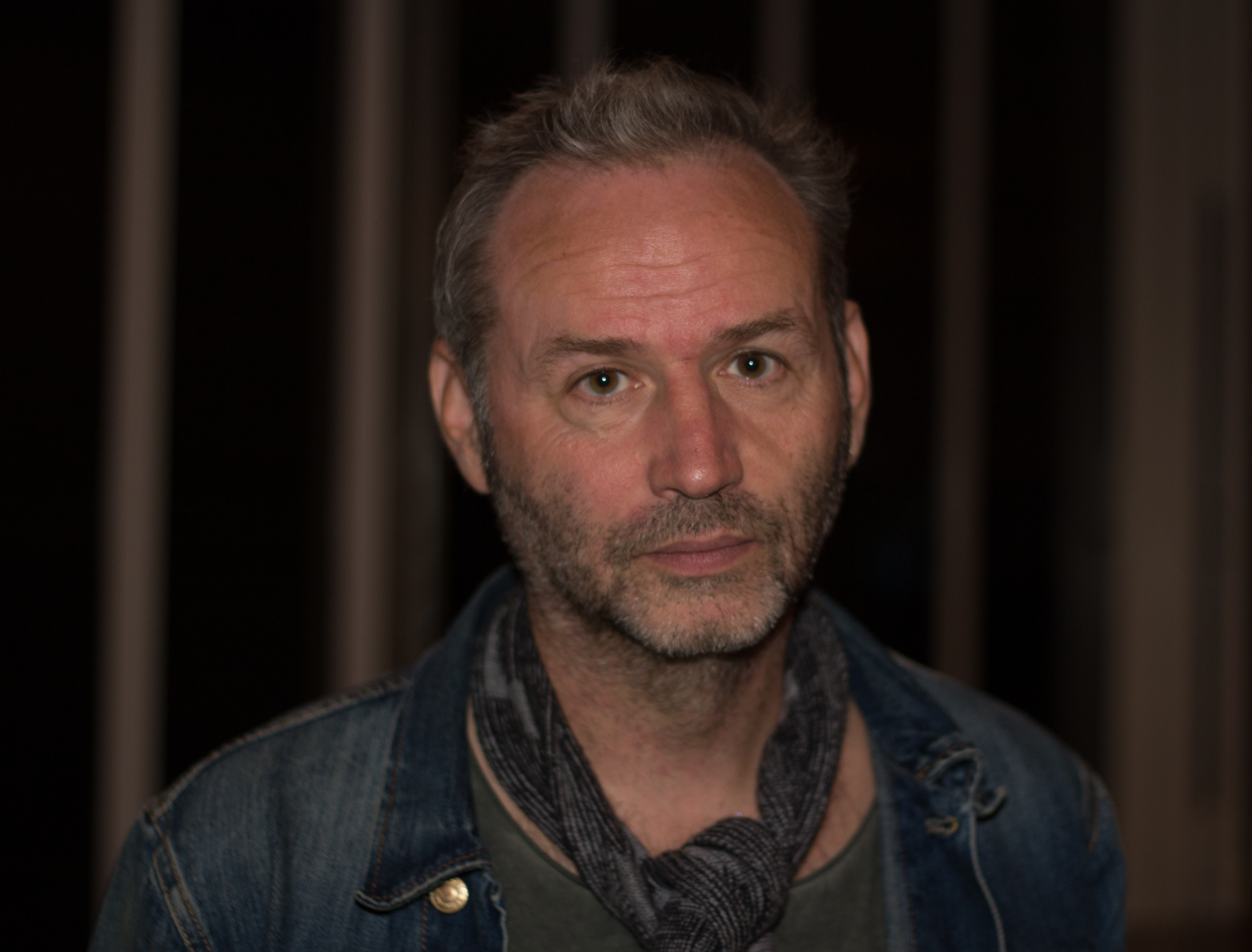 David Kleijwegt, producer bij de VPRO.